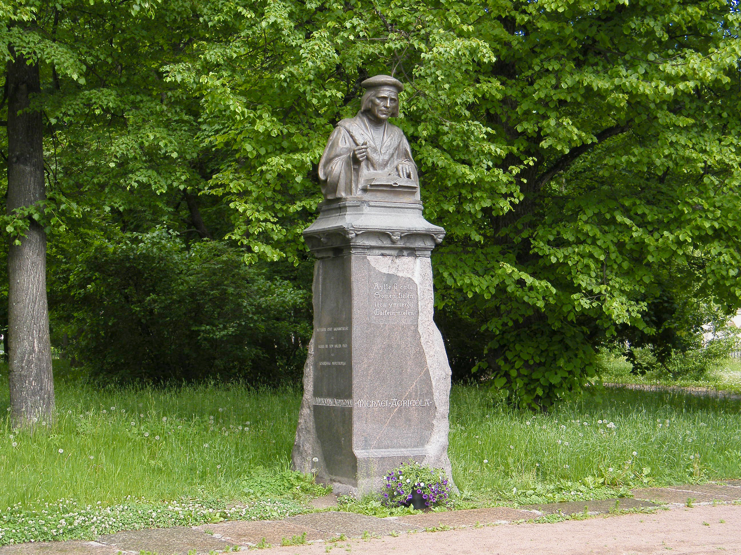 Памятник Микаэлю Агриколе